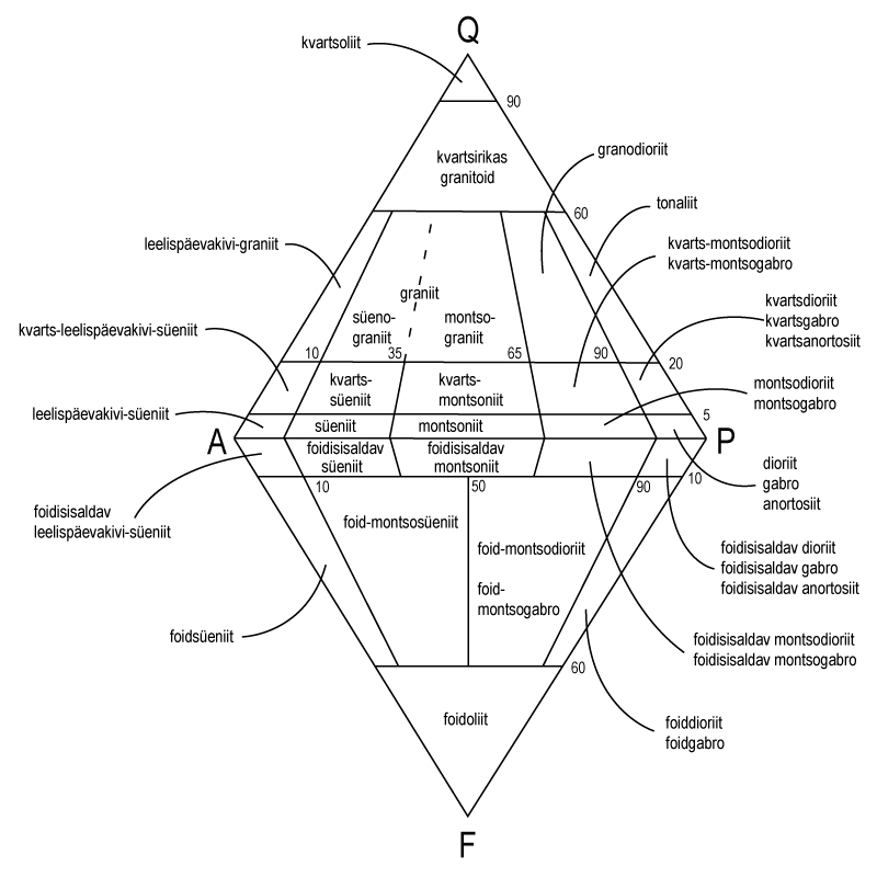 QAPF-diagramm